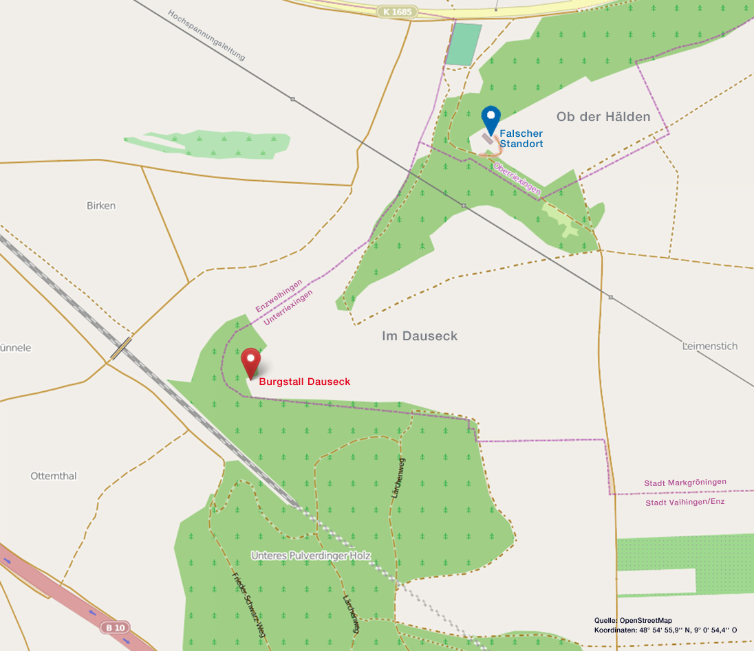 Lage des Burgstalls der Dauseck am Westende der Unterriexinger Markung